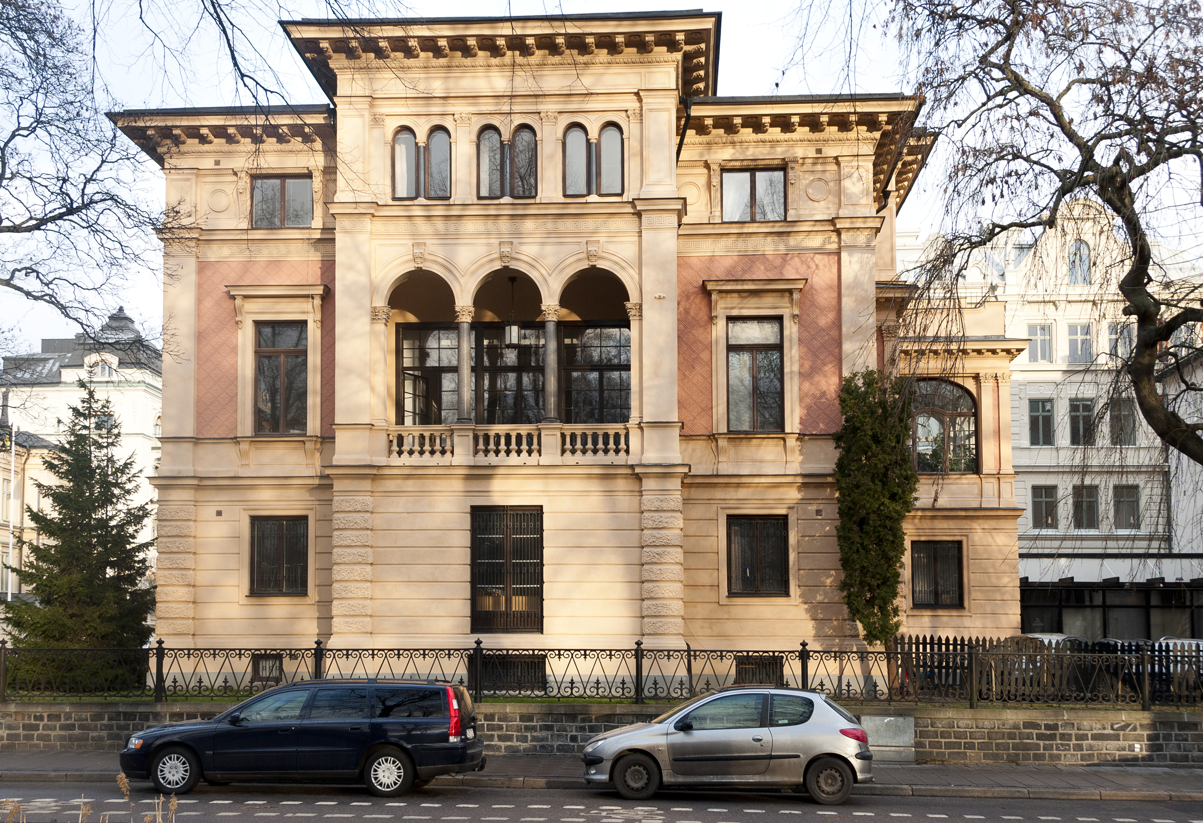 Adelsköldska villan, Karlavägen 33, Villagatan 2. Byggnadsår 1887-88, arkitekt Wilhelm Klemming efter byggherrens utkast, byggherre Claes Adelsköld, byggmästare först W Klemming därefter O Herrström